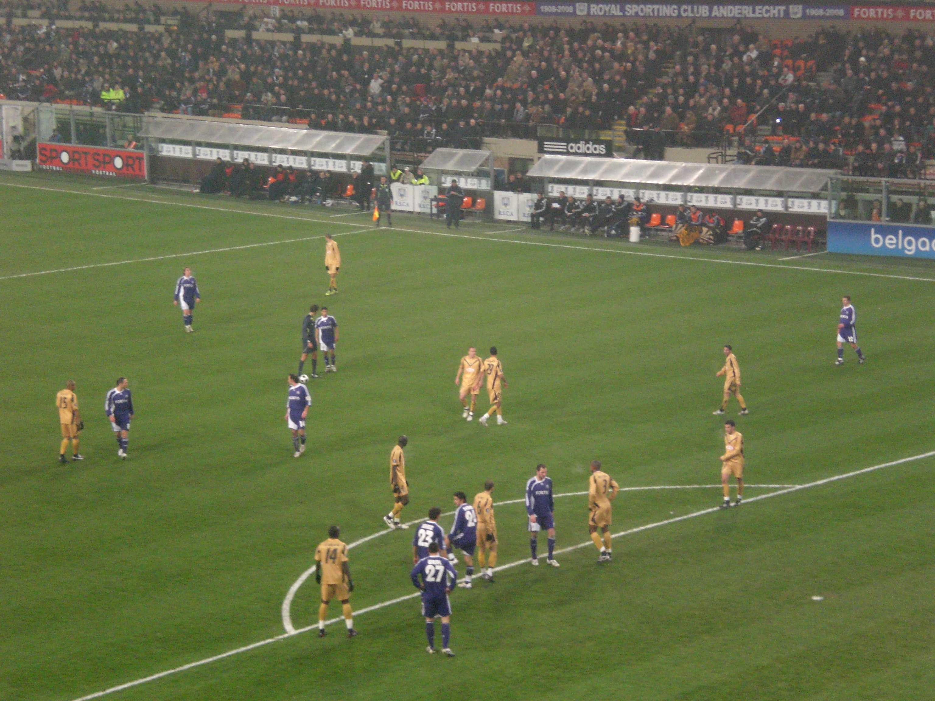 M'bark Boussoufa s'apprête à donner un coup-franc lors du match de 1/16ème de finale de Coupe UEFA RSC Anderlecht - FC Girondins de Bordeaux (2-1).